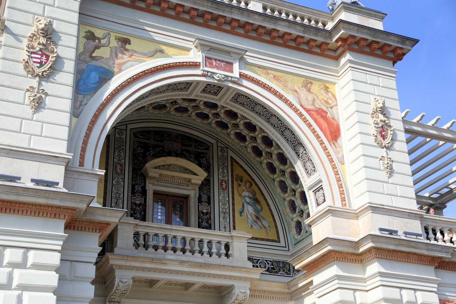 Várkert Bazár megnyitásakor, 2014.04.03.